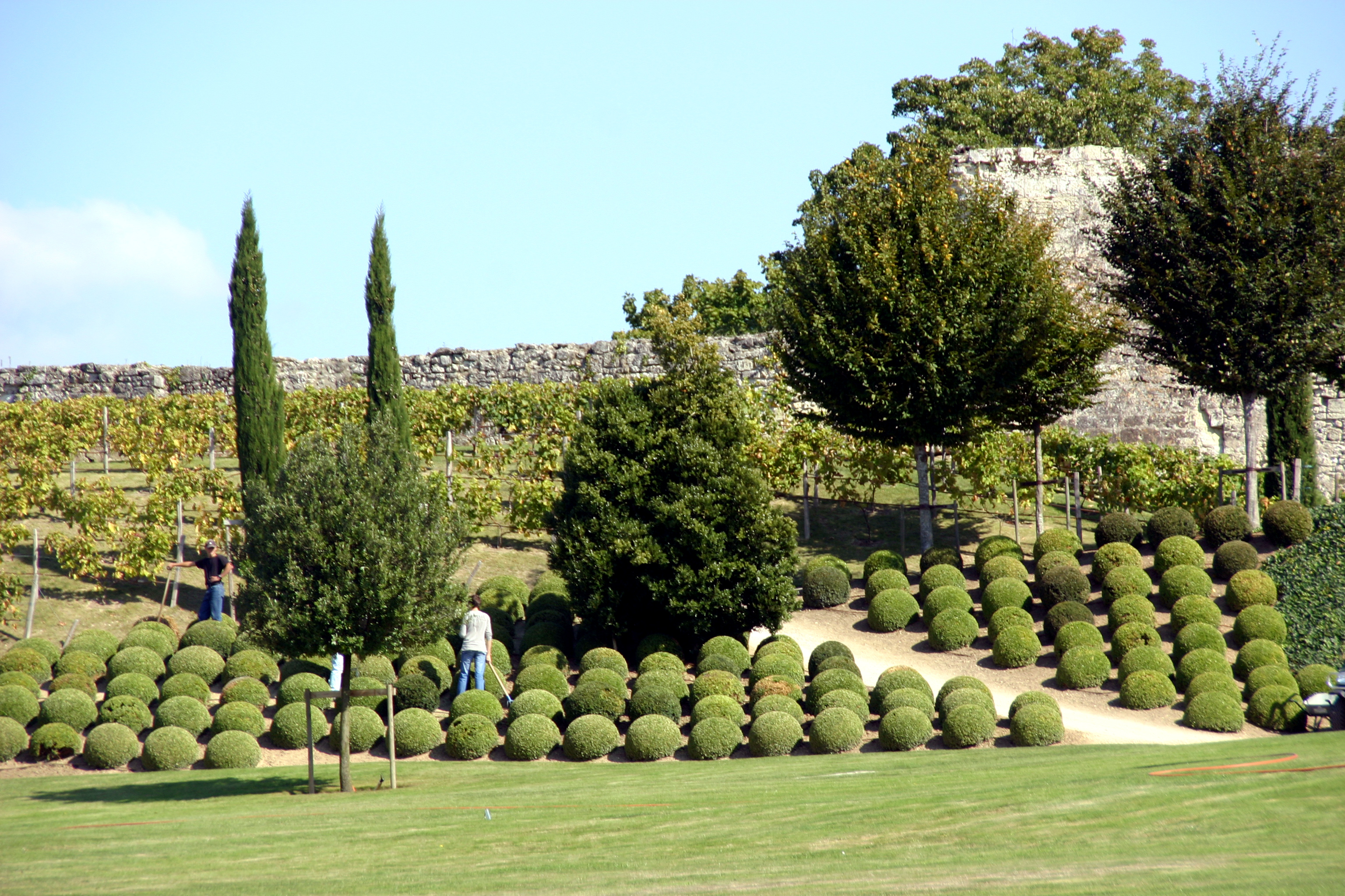 Château d'Amboise